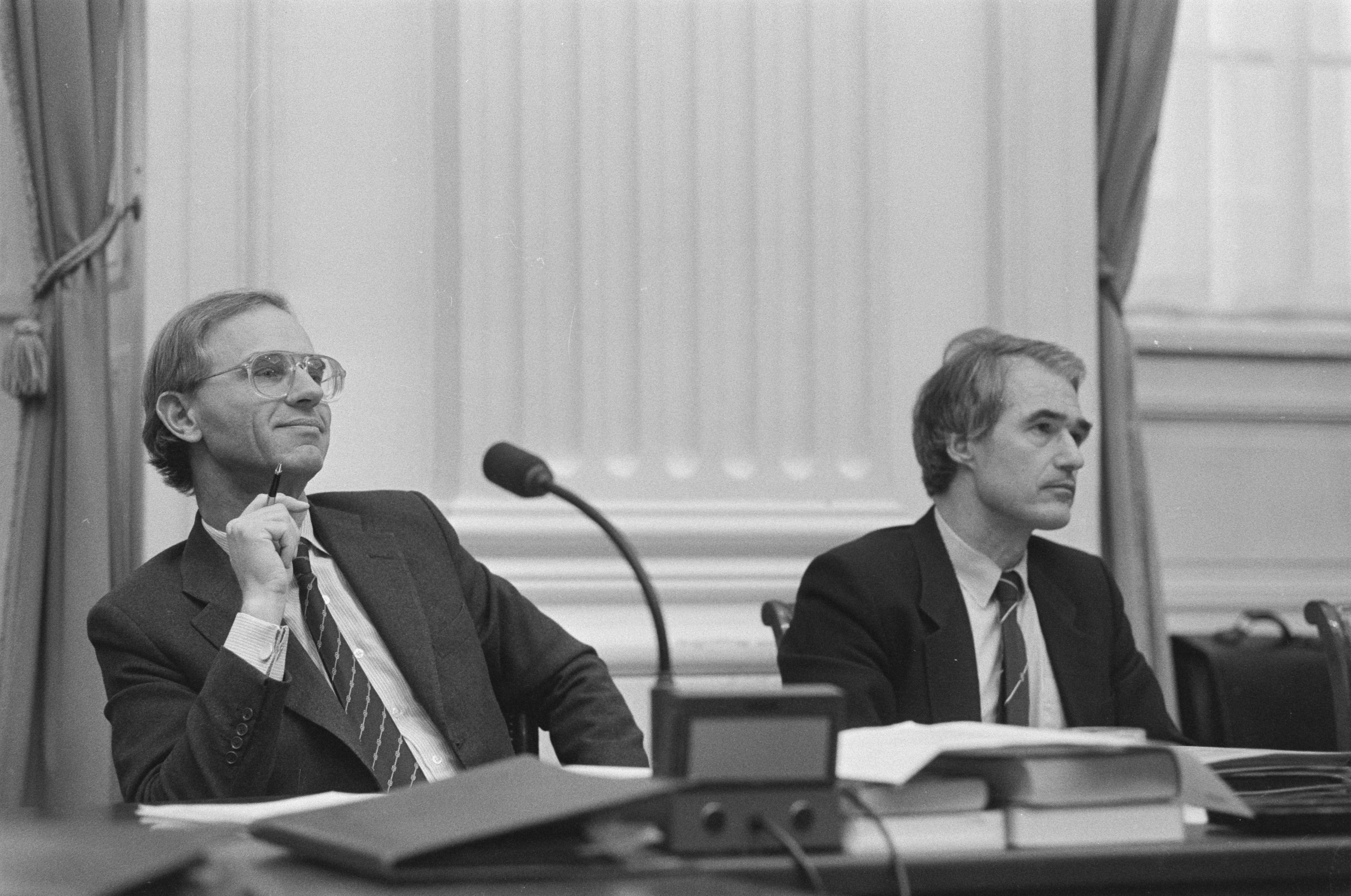 Collectie / Archief : Fotocollectie Anefo Reportage / Serie : [ onbekend ] Beschrijving : Tweede Kamer debatteert over sociaal economisch beleid van kabinet Lubbers; minister Ruding tijdens debat Annotatie : Rechts minister De Korte van Economische Zaken Datum : 11 maart 1987 Trefwoorden : politiek Persoonsnaam : Ruding, Onno Fotograaf : Croes, Rob C. / Anefo Auteursrechthebbende : Nationaal Archief Materiaalsoort : Negatief (zwart/wit) Nummer archiefinventaris : bekijk toegang 2.24.01.05 Bestanddeelnummer : 933-9175